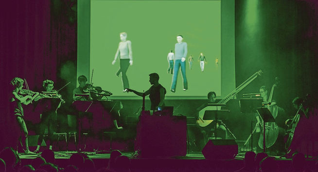 Ich habe das Bild selbst fotografiert und tragen zum Artikel ein.